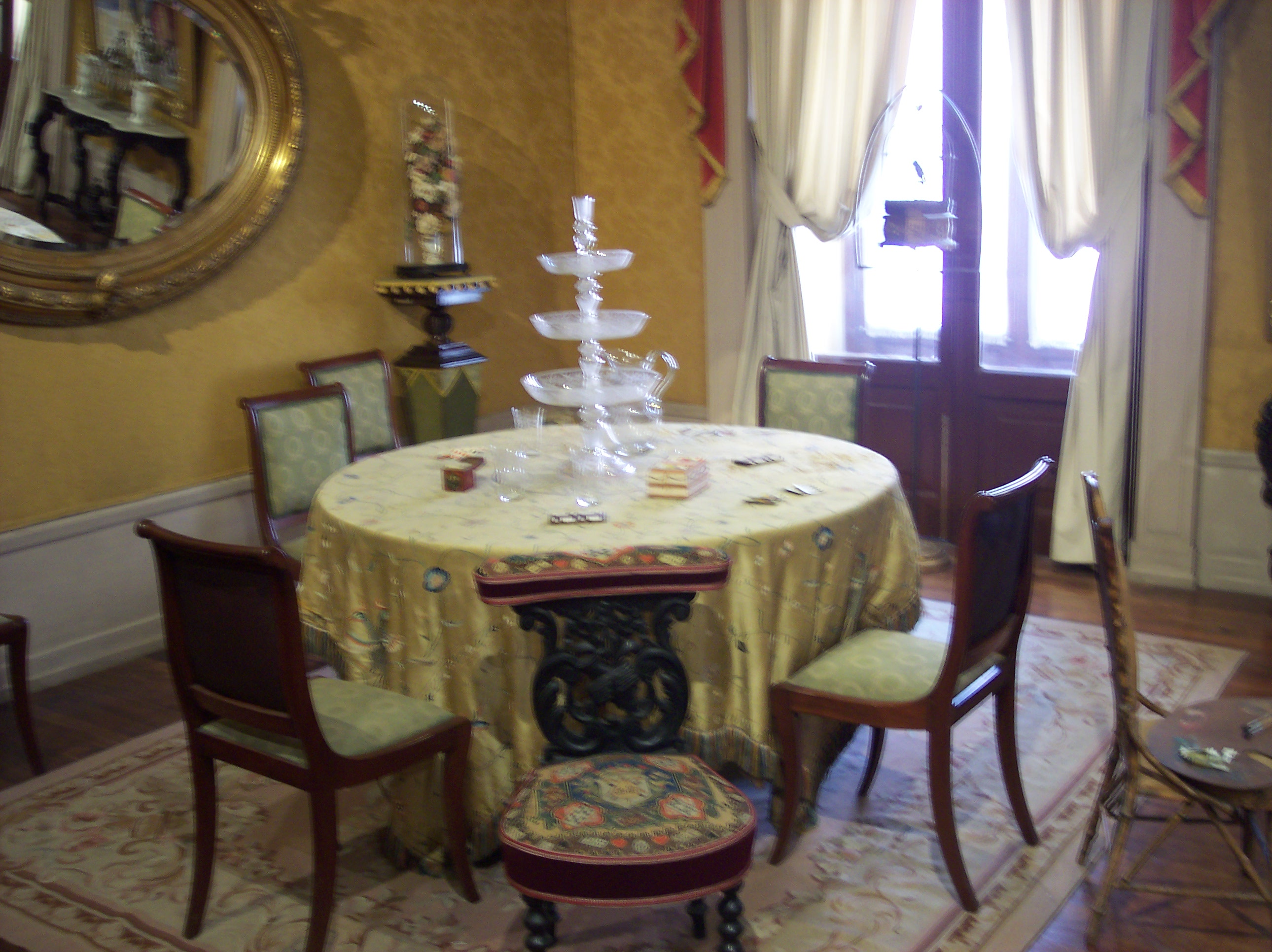 Recreación del comedor. Photo taken in Benito Juárez Museum. National Palace. D. F. Mexico SPANISH: Fotos tomadas en el Recinto a Juárez. Palacio Nacional. México D.F.